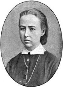 Sof'ja L'vovna Perovskaja (1853-1881)